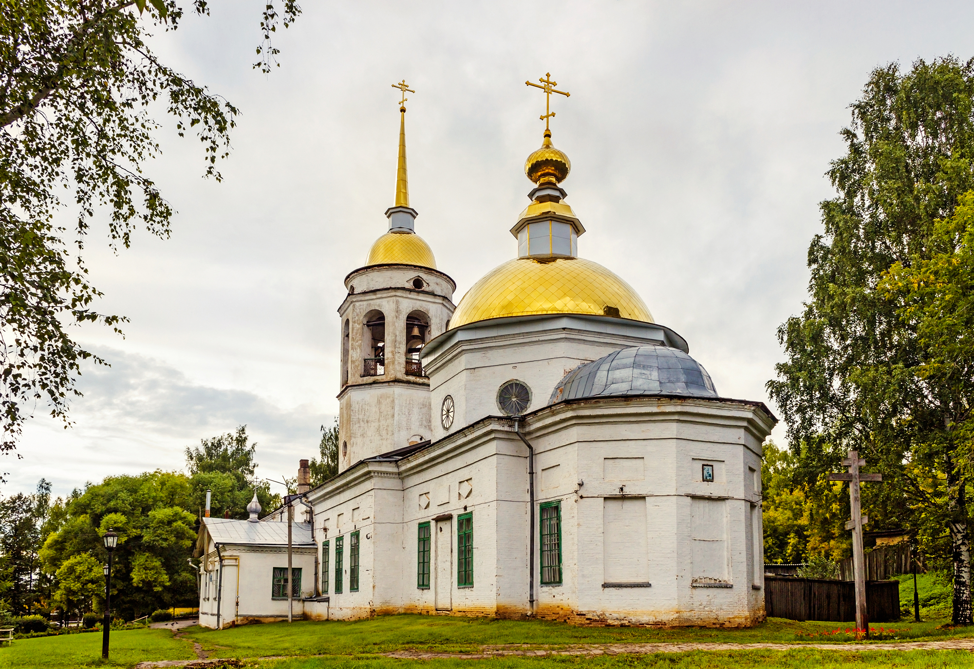 Церковь Николая Чудотворца: улица Советская, 33, Кудымкар, Пермский край